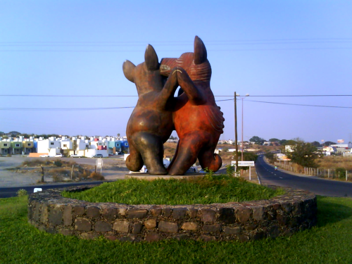 Tipicos perritos bailando en la Ciudad de Colima, Mexico.